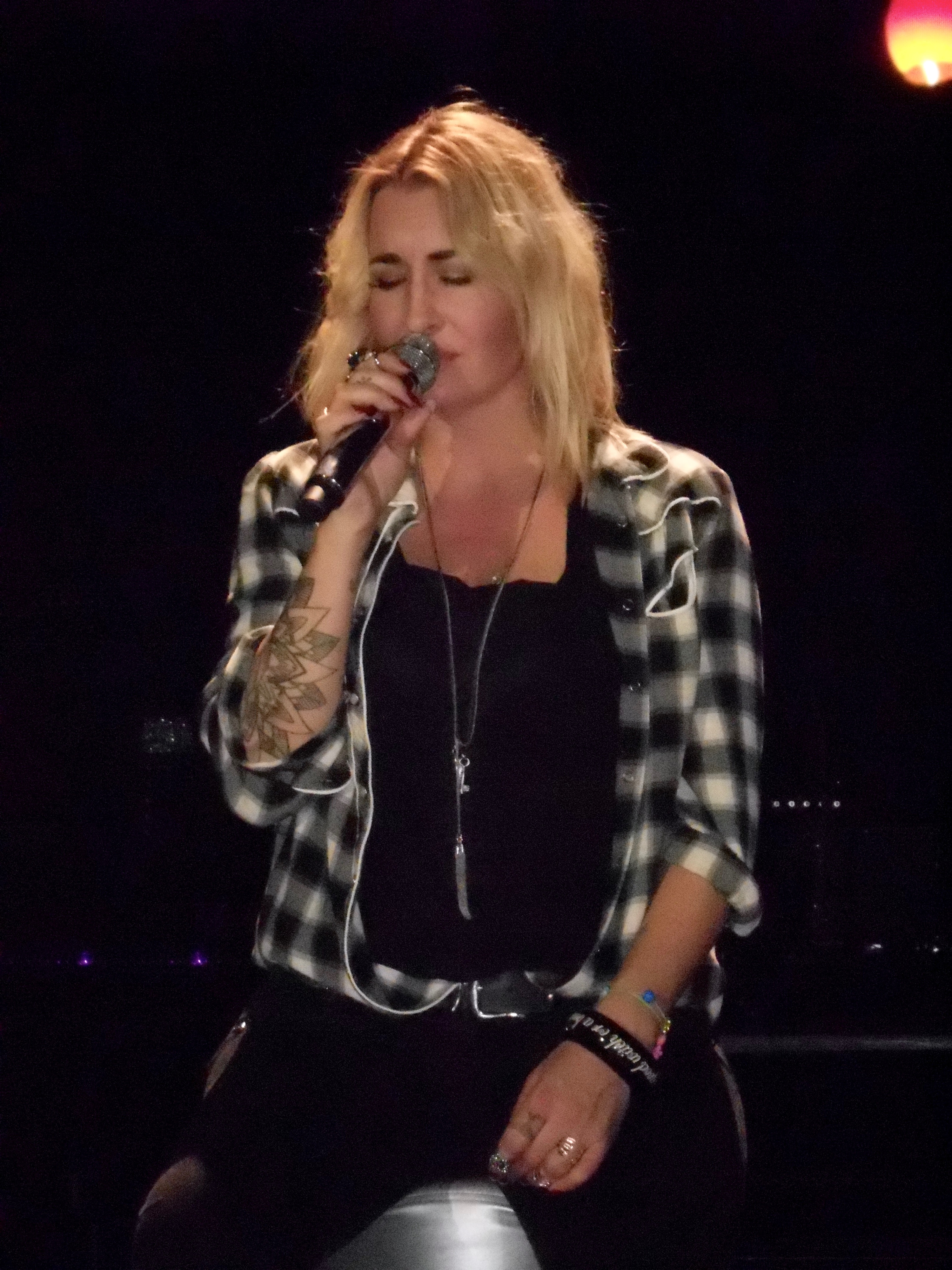 Sarah Connor während ihrer Muttersprache-Tour in Bremen